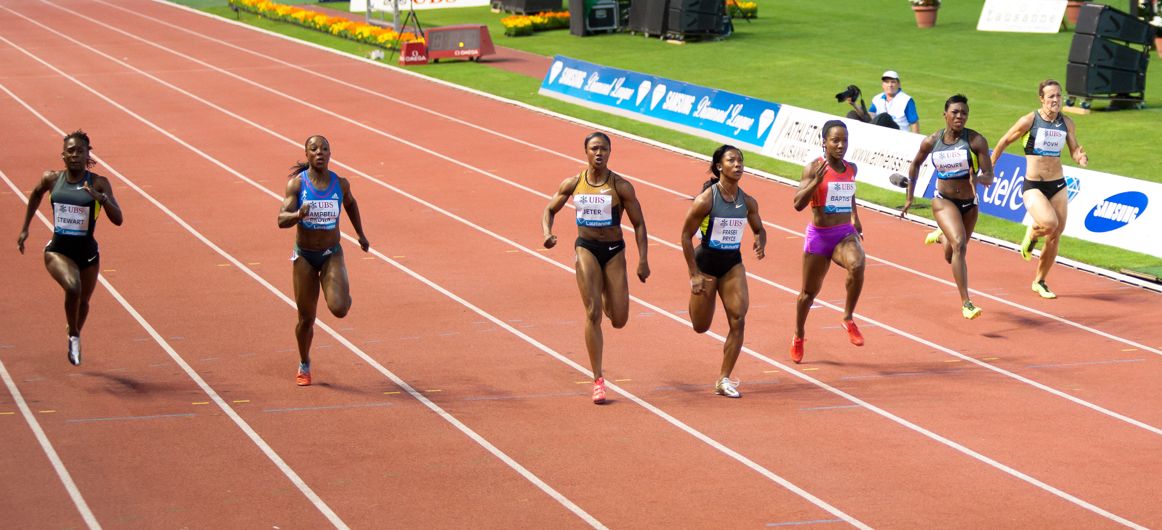 Athletissima 2012 - 100m F